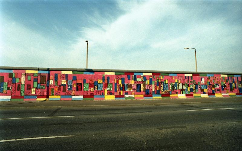 25.7.1991 "East-Side-Galery", gelegen zwischen der Jannowitzbrücke und der Oberbaumbrücke Reste der Berliner Mauer, die nach der Öffnung von vorwiegend ostdeutschen Künstlern auf der Ost-Seite bemalt wurden.